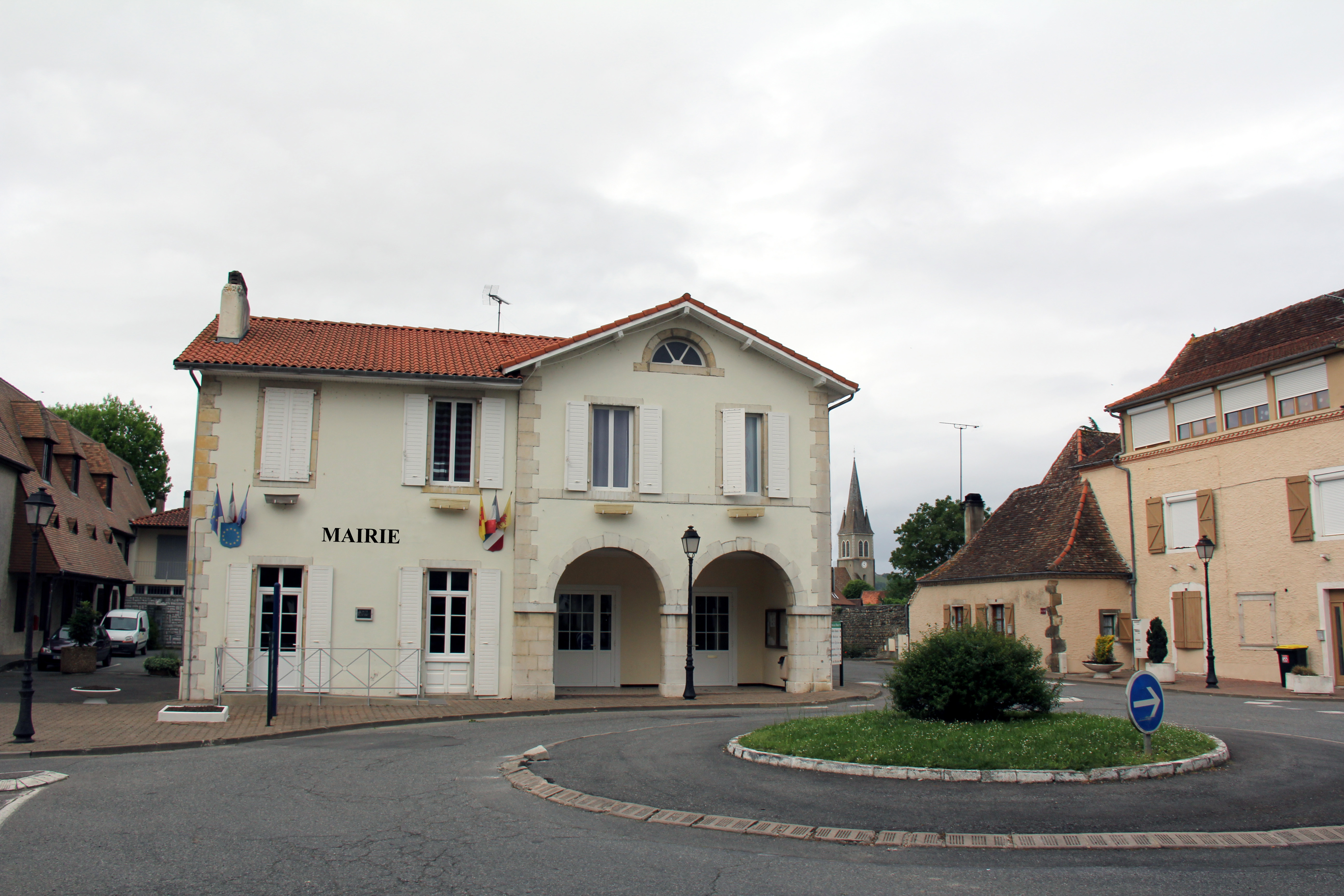 Le village de Maslacq -- Photo amateur prise par moi-même